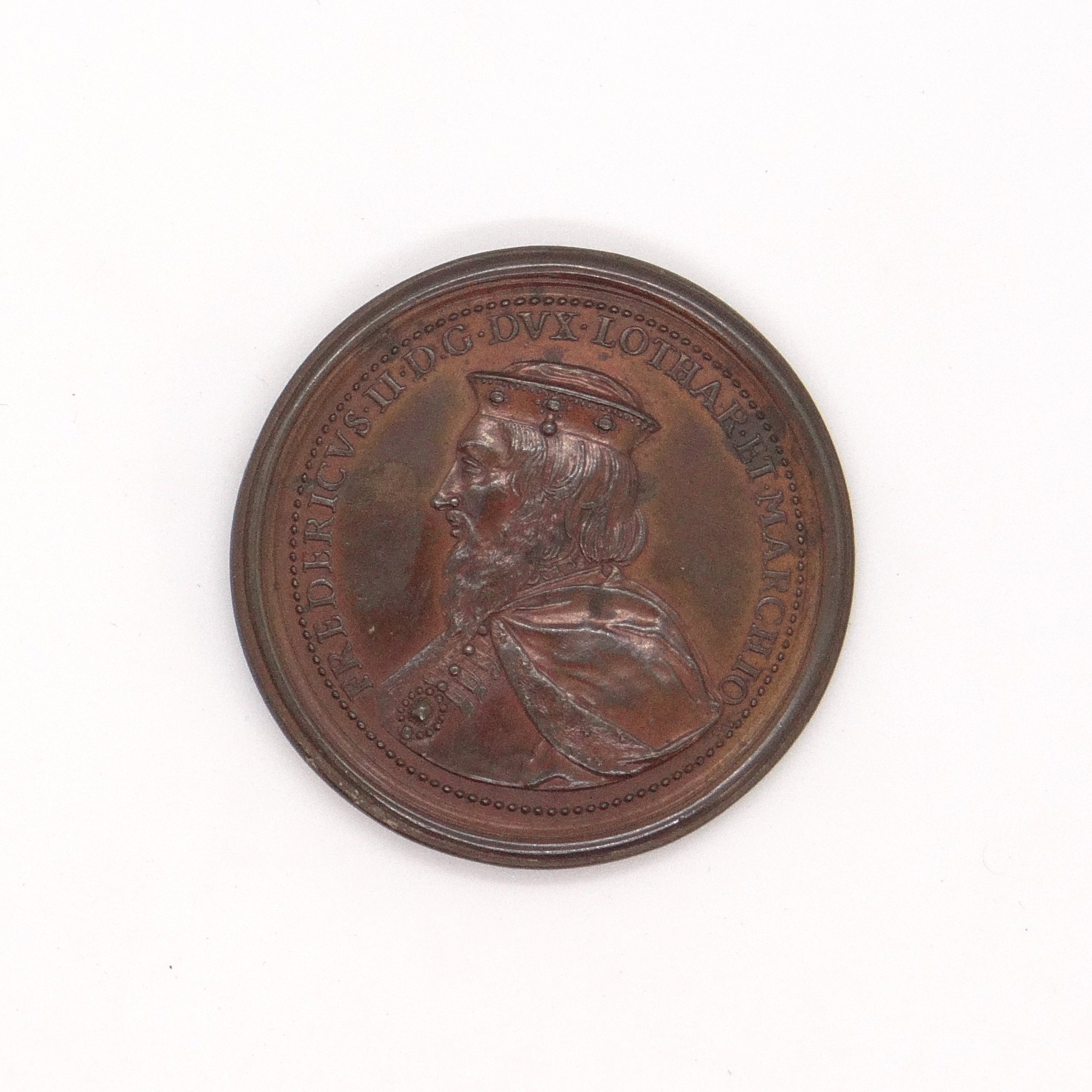 Médaille en bronze par le graveur Ferdinand de Saint Urbain. Figure : buste de Frédérique II (ou Ferry II) de profil gauche, inscription « Fredericus II · DG Dux Loth Et Marchion ».